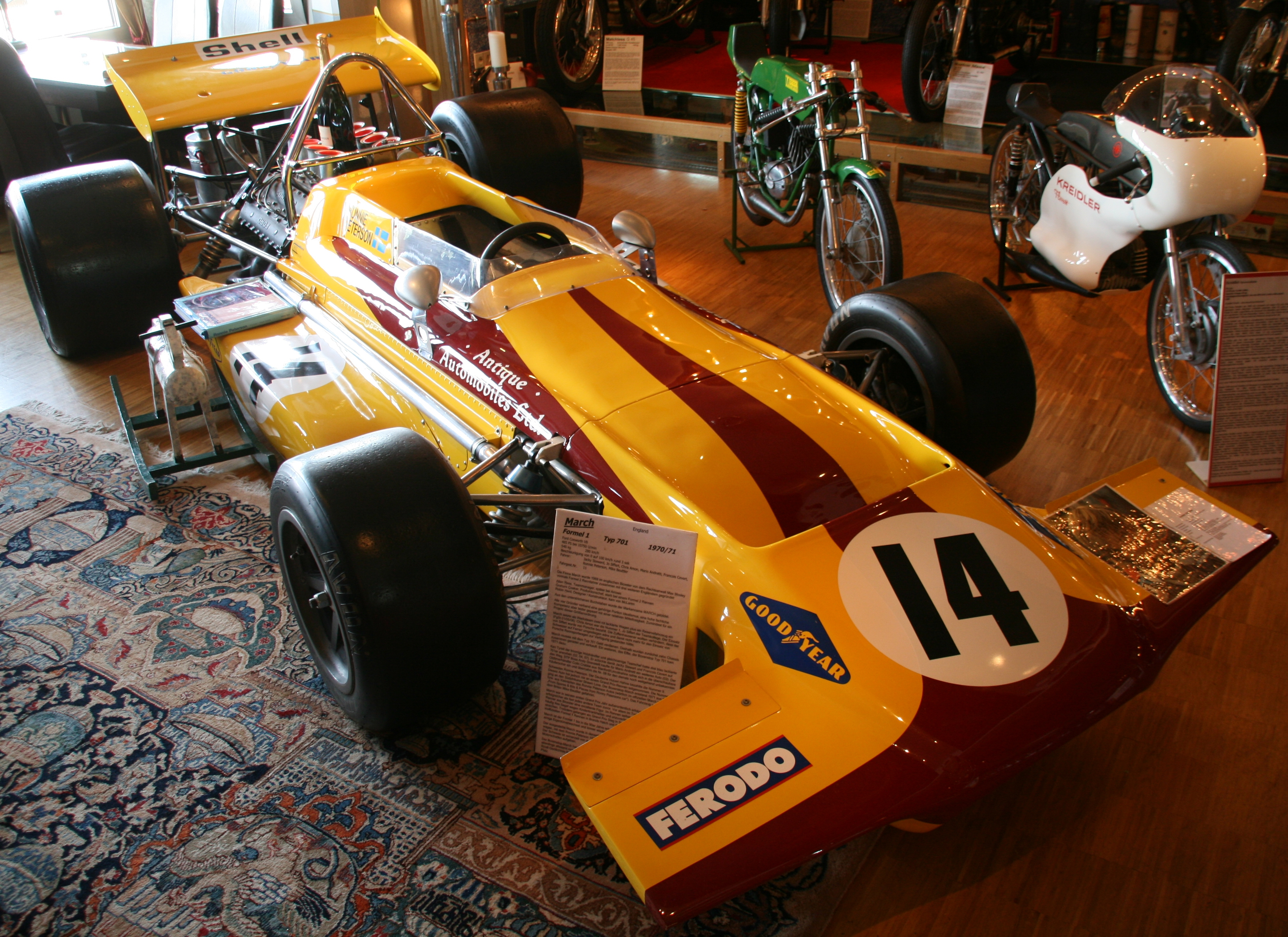 March 701 im Boxenstop Tübingen